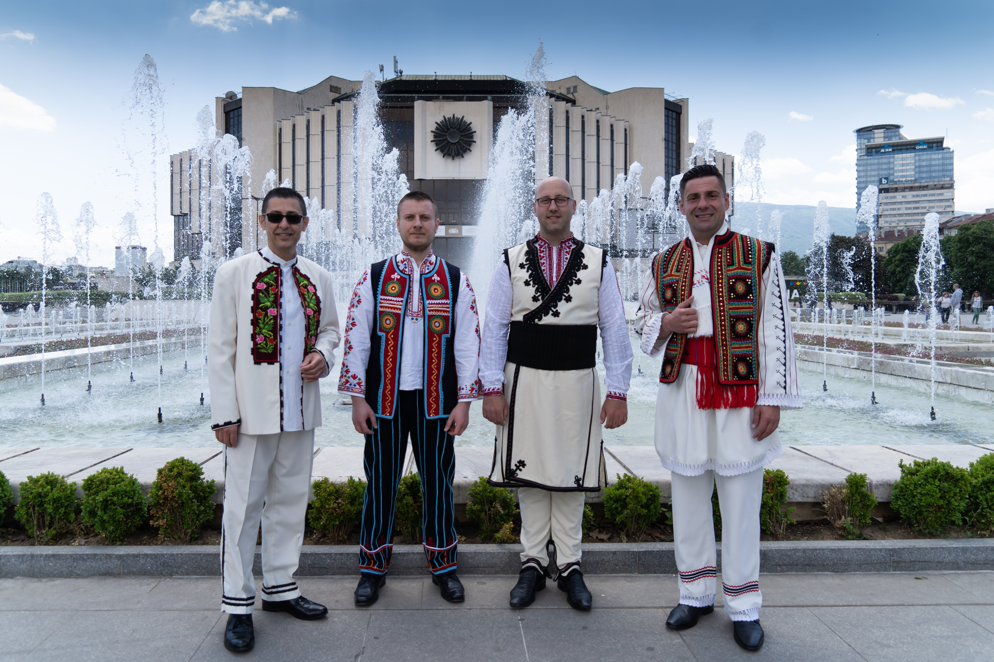 Квартет Светоглас на снимки за филма "За смисъла на Астрологията" на режисьора Стилиян Иванов